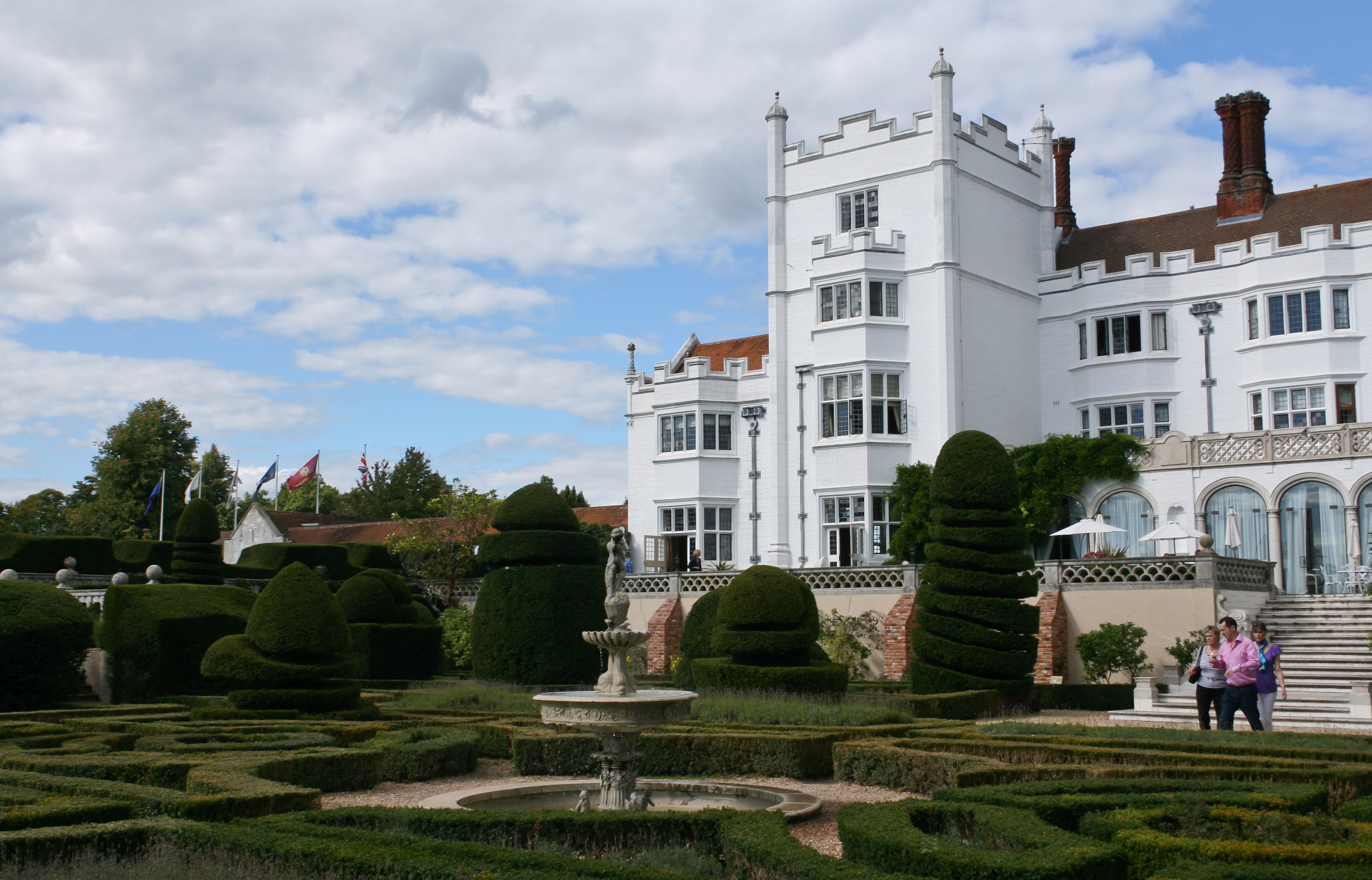 Danesfield House